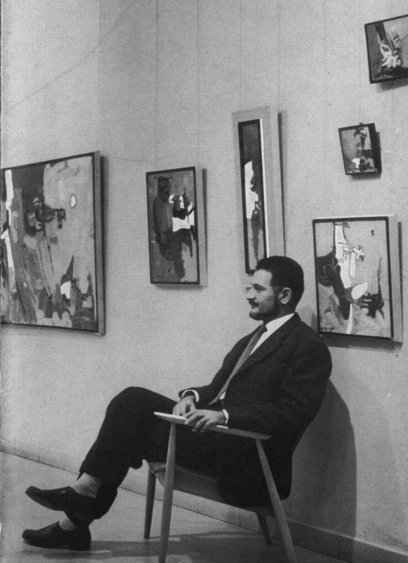 האמן מיכאל ארגוב